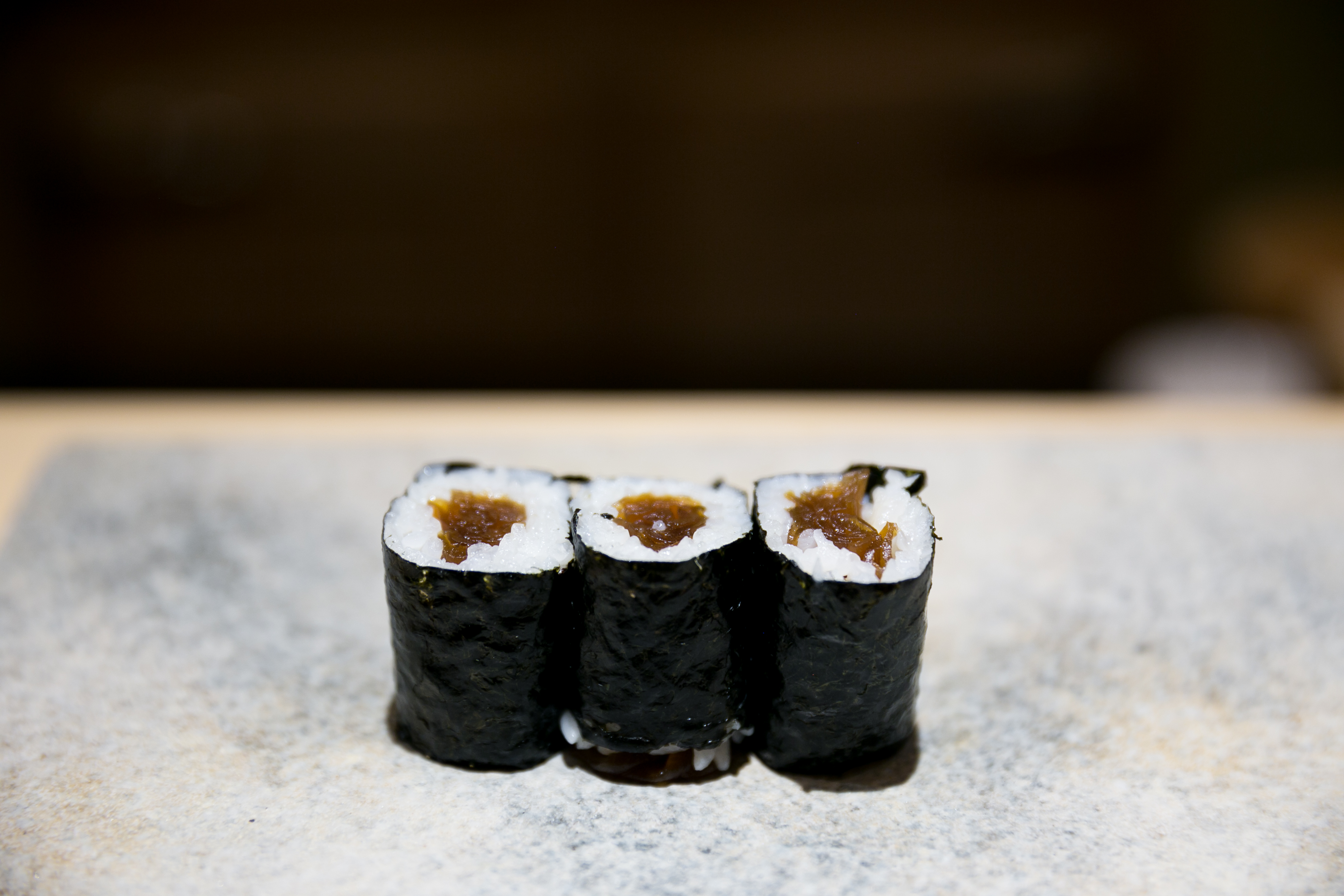 Kanpyo maki (干瓢巻き / dried gourd roll)